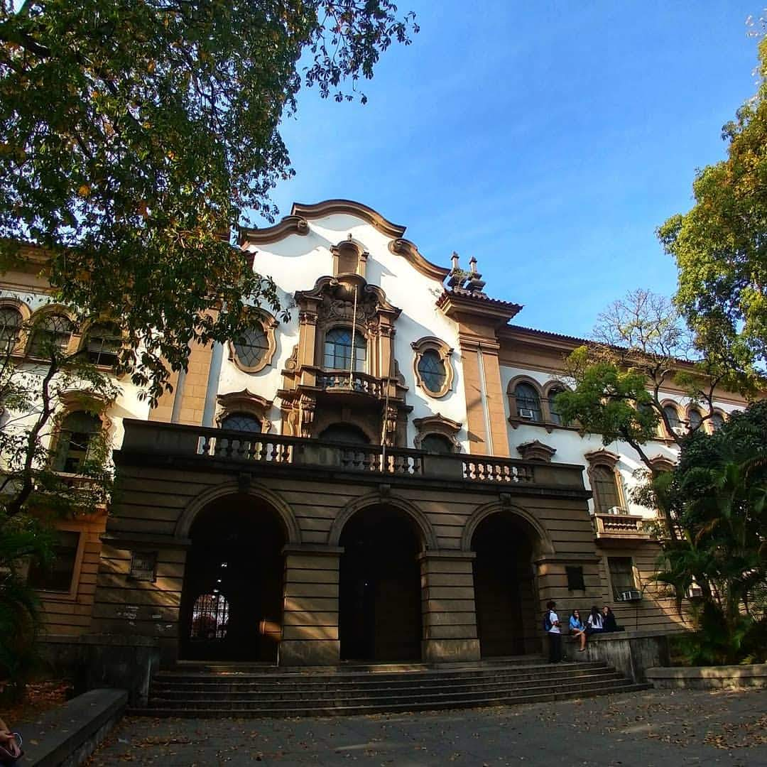 fachada do prédio central do iserj pela rua mariz e barros